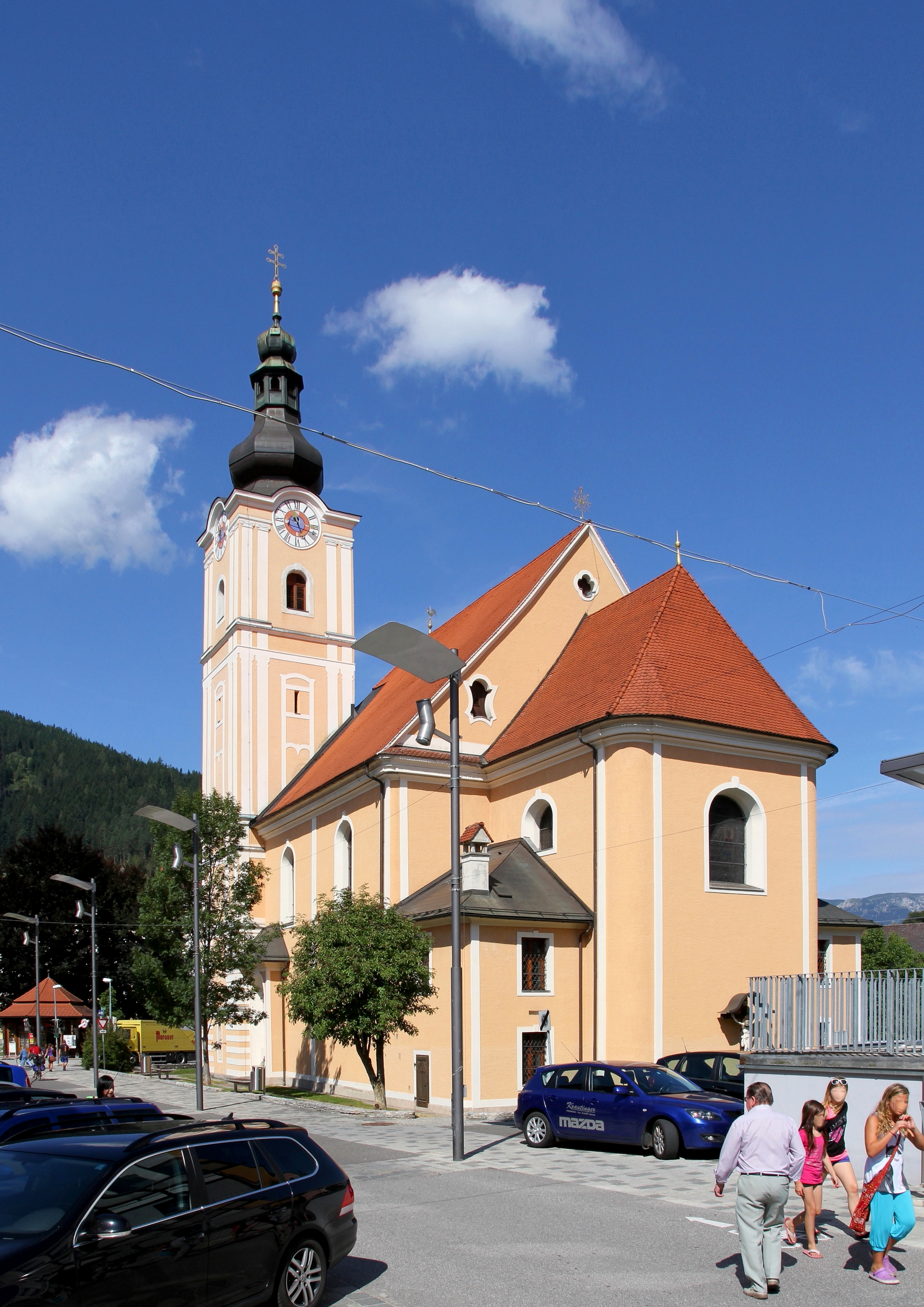 Katholische Pfarrkirche hl. Kunigunde in der steirischen Bezirkshauptstadt Mürzzuschlag.